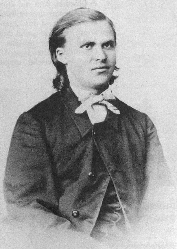 Friedrich Nietzsche, 17 years old in Naumburg